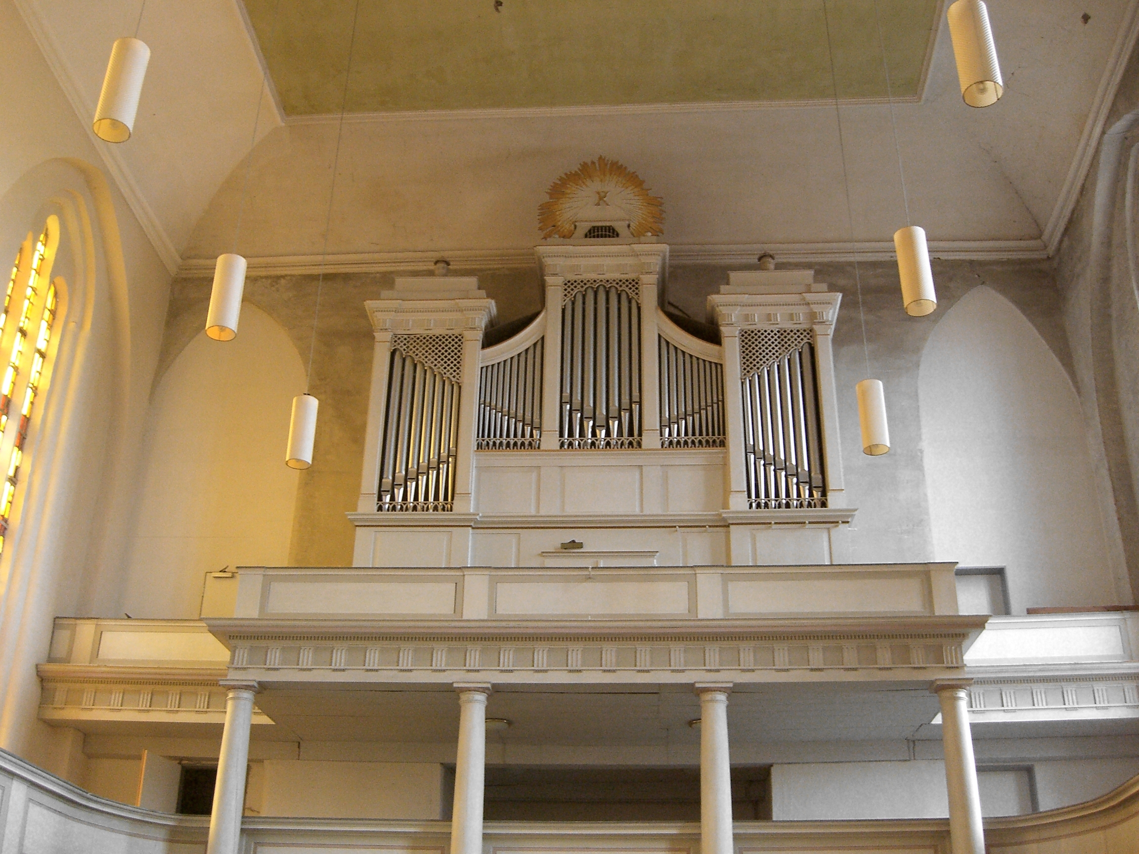 Waren (Müritz) Orgel der Kirche St. Marien